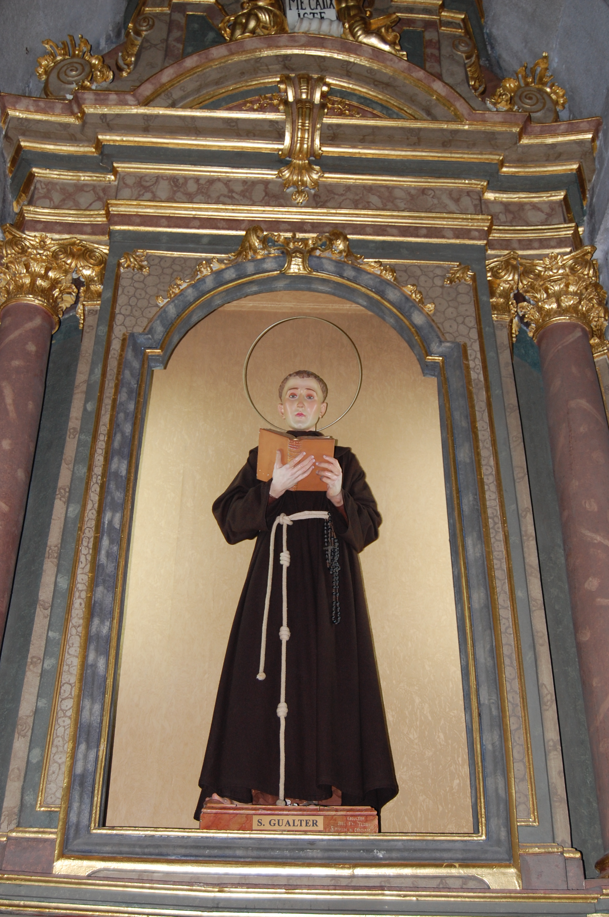 A cidade de Guimarães (distrito de Braga, noroeste de Portugal.